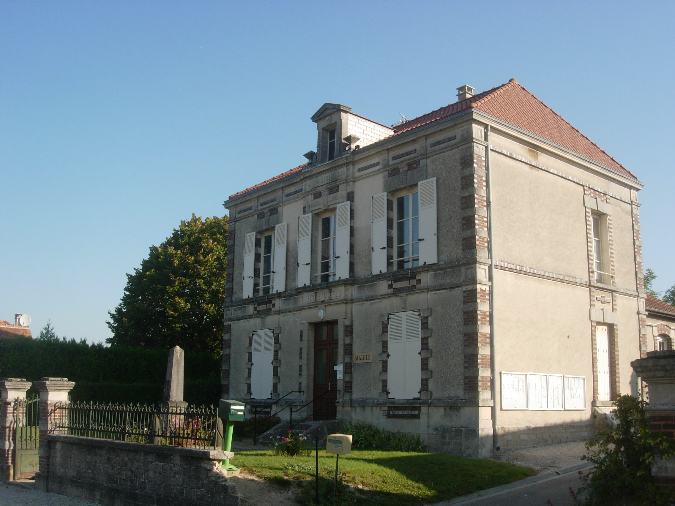 Mairie de Trouans